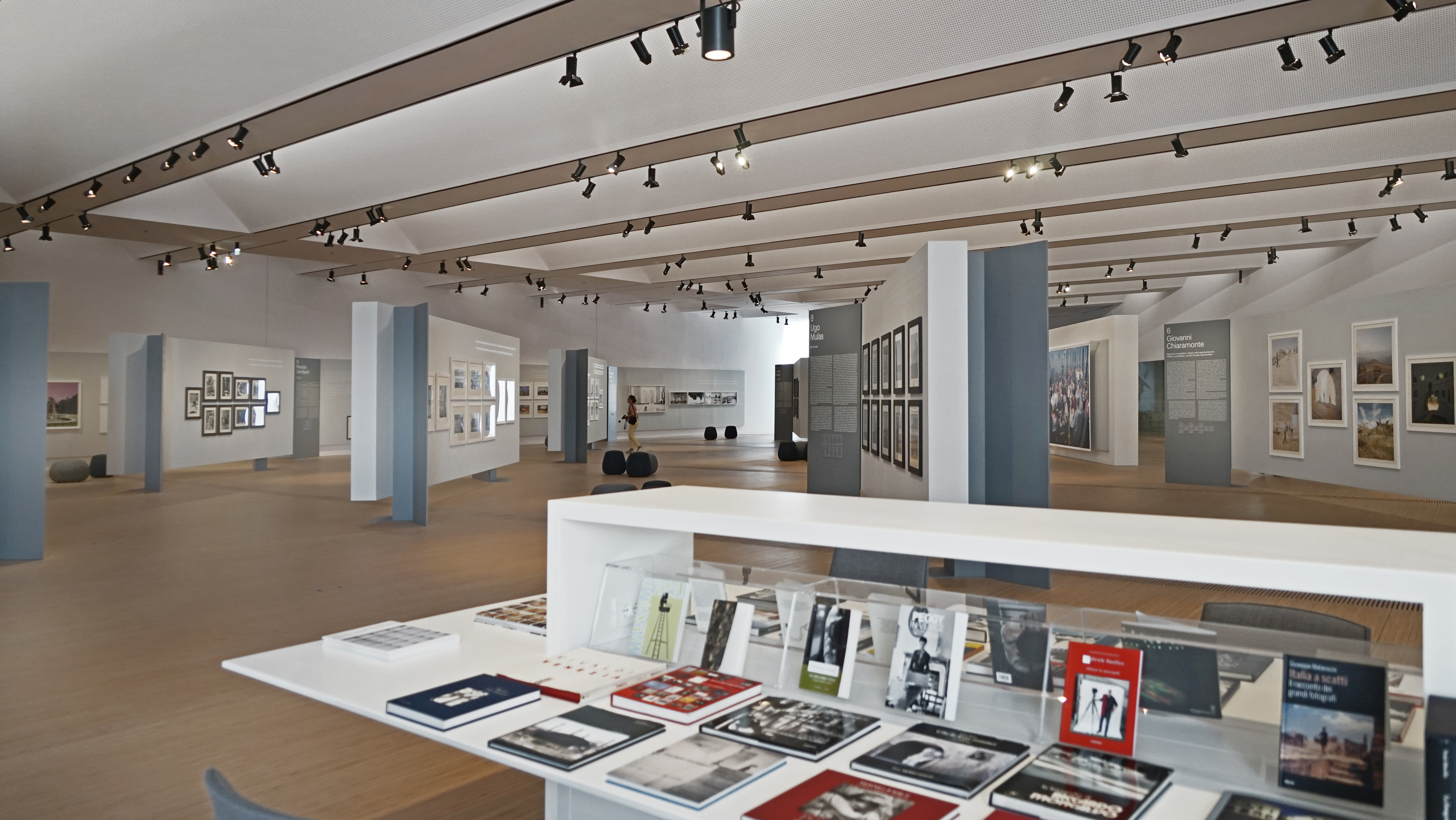 Exposition temporaire : l'Italie des photographe (24 artistes) dans la salle du 3ème étage du musée M9 Au premier plan, les ouvrages de photographie en consultation. Le M9 a pour but explicite de "parcourir le passé (NDLR de l'Italie), comprendre le présent et imaginer le futur". C'est un musée de la civilisation italienne du 20è siècle, sans collection d'objets, dans lequel les thématiques sont traitées exclusivement de manière multimédia. Les dispositifs numériques interactifs y sont très nombreux, dans les salles des deux étages de l'exposition permanente (2610 m2), ce qui est très attractif pour un public jeune. Un troisième étage (1400 m2) est consacré aux expositions temporaires. Le bâtiment possède un auditorium - cinéma 4K de 200 places équipé de casques de réalité virtuelle, une boutique-librairie, un restaurant, de vastes espaces d'accueil du public. C'est un musée ultra-moderne, pièce maîtresse, d'un projet de rénovation urbaine du centre de Mestre, piloté par la "Fonzione di Venezia" et qui comprend également un centre commercial créé dans un ancien couvent, des magasins, des restaurants et cafés, animant le nouveau quartier. La partie permanente du musée M9 est organisée autour de 8 grands thématiques : 1. Démographie et structures sociales 2. Consommation, coutumes et modes de vie italiens. 3. Science, technologie, innovation 4. Économie, travail, production et bien-être 5. Paysages et agglomérations urbaines 6. L'État, les institutions, la politique 7. Éducation, formation et information 8. L'identité italienne. Les thématiques sur le site du M9